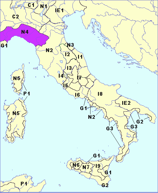 Ligurian Language Area